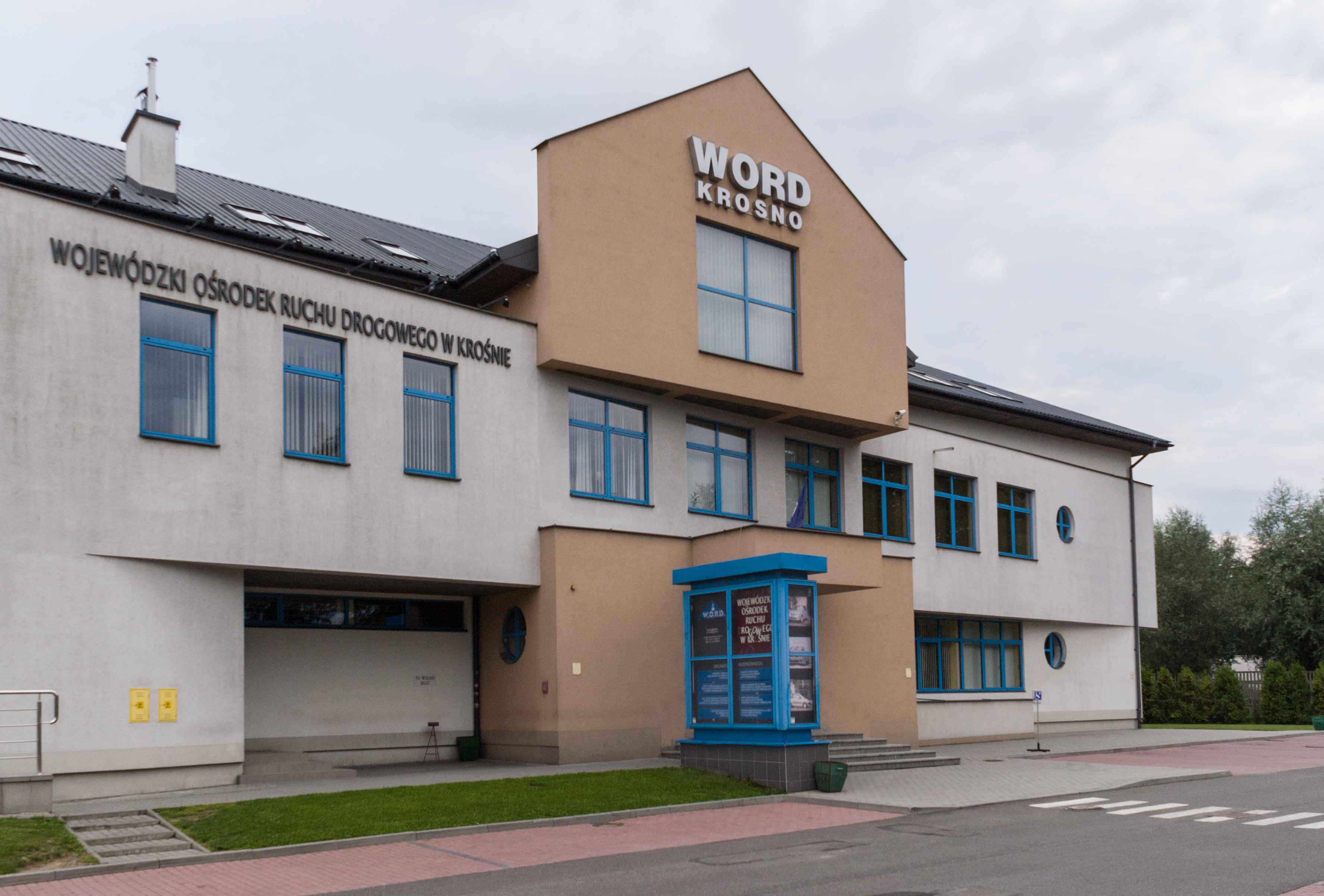 Wojewódzki Ośrodek Ruchu Drogowego w Krośnie, ul. Tysiąclecia 7